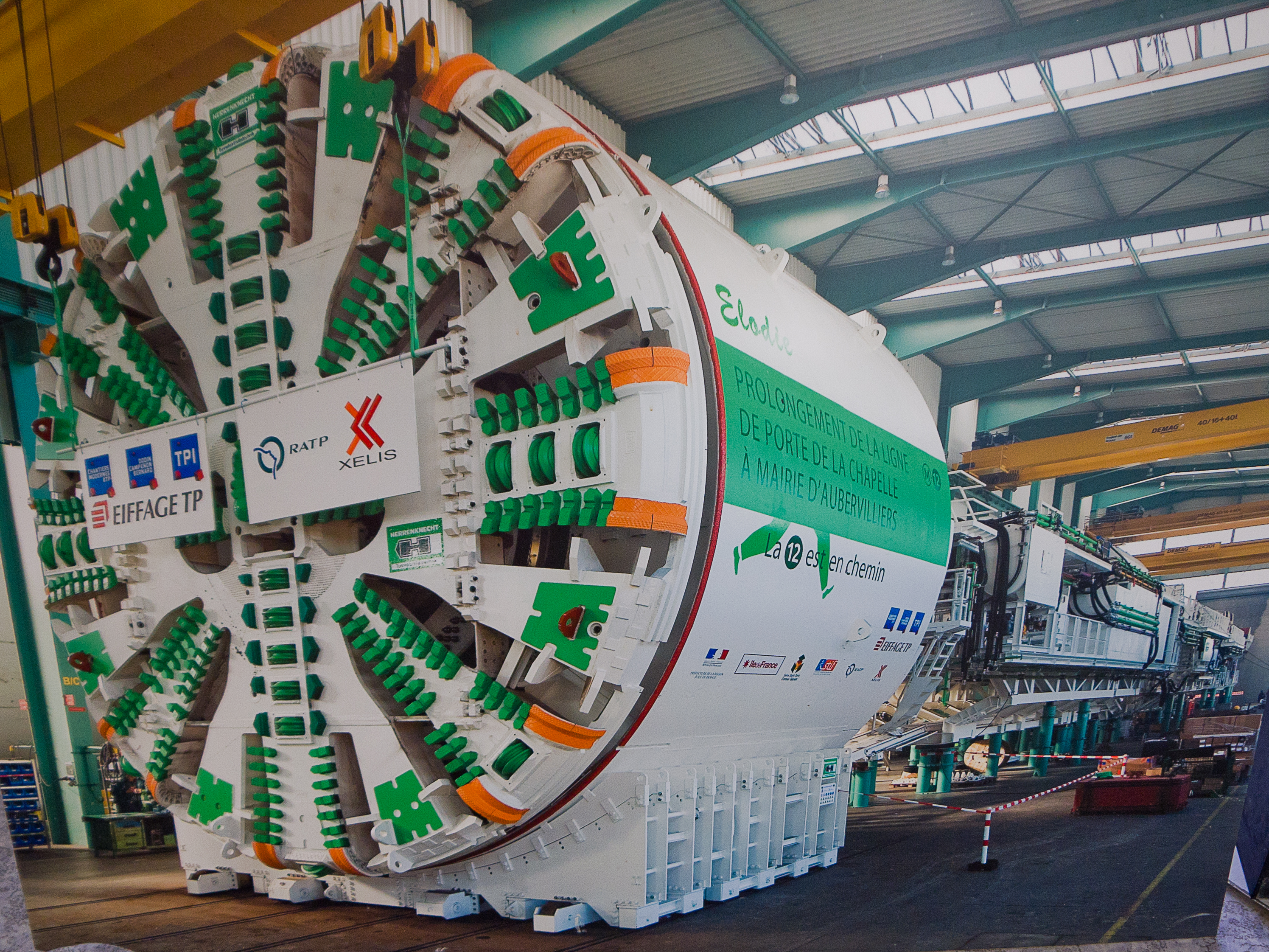 photo de la roue de coupe du tunnelier Elodie. Le tunnelier Elodie a été construit en Allemagne dans les ateliers Herrenknecht à Schwanau. Il mesure 82m mètres de long, 9 mètres de diamètre, pèse 1 400 tonnes et avance en moyenne de 12 mètres par jour (entre 0 et 28 mètres selon les jours). Il porte le nom de sa marraine, Elodie Murat, conductrice sur la ligne 12.